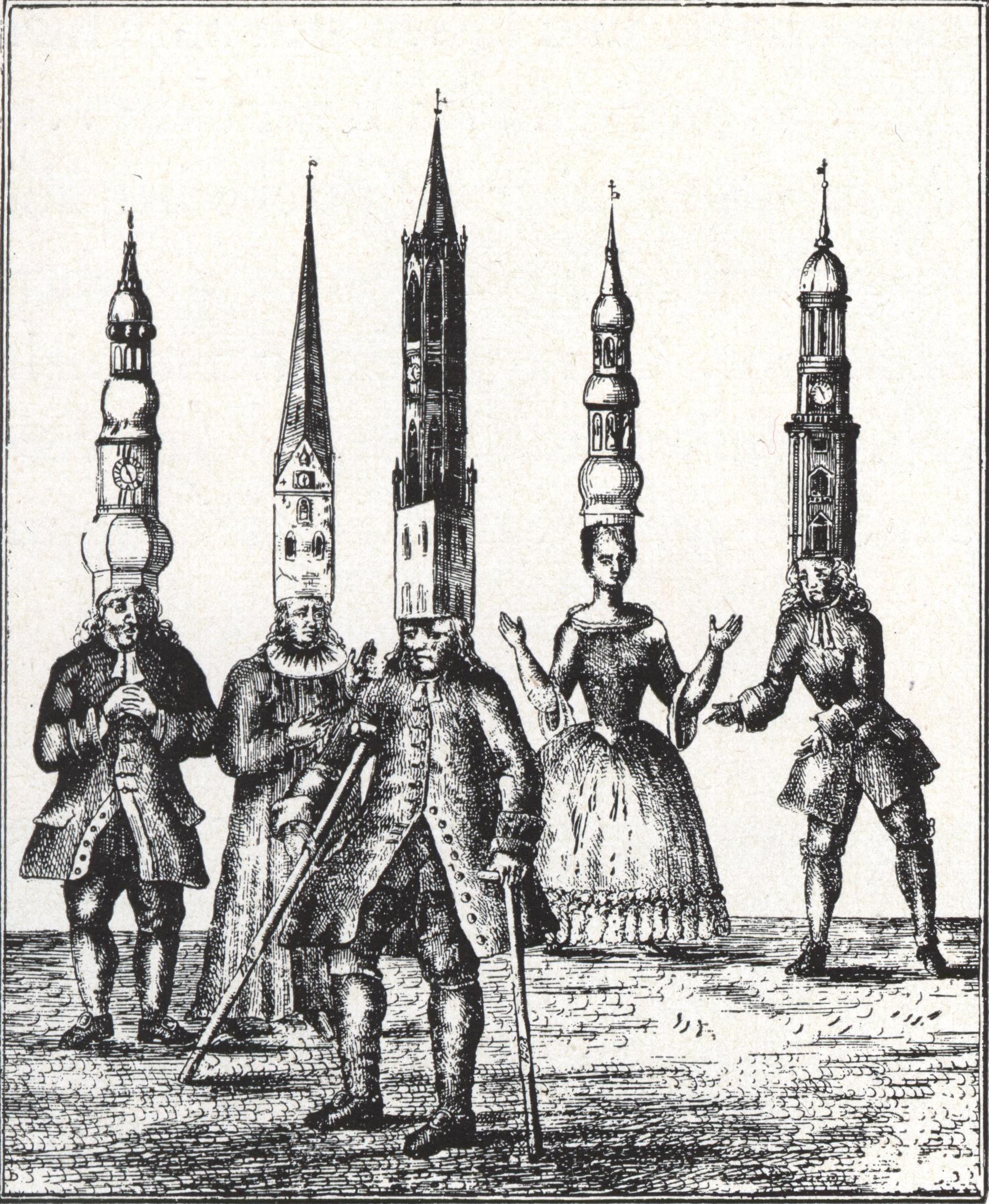 Karikatur in einem Flugblatt von 1825/1827 zur Erneuerung des Turmhelms der Hauptkirche St. Jacobi in Hamburg. Da das Kirchspiel die Reparaturkosten für den kuppelförmigen Renaissance-Turmhelm nicht aufbringen konnte, hatte man ihn 1810 auf Abbruch verkauft. An seiner Stelle wurde dem Turm später ein mehrstöckiges gemauertes Oktogon in gotischen Formen nach Entwürfen von Hermann Peter Fersenfeldt (1786-1853) aufgesetzt und bis 2. August 1827 fertiggestellt. Ob der alte Turmstumpf das schwere Mauerwerk werde tragen können, war bis dahin heftig umstritten, wie in der Inschrift unter der Karikatur zum Ausdruck kommt: "Peter, Nicolaus, Catharina und Michael wundern sich, daß der Bruder Jacob bei hohem Alter und schwachen Füßen noch eine so schwere und bunte Mütze tragen will." Das Bild zeigt den Nikolaiturm allerdings links neben dem von St. Petri. Erwähnt in Anzeiger des Germanischen Nationalmuseums Jahrgang 1911, S. 13 unter Kupferstichkabinett. Geschenke: "Lübeck. Prof. Th. Hach. 1. Spottblatt auf die Restauration einer Kirche: "Der alte Jacob mit der neuen Mütze"; auf den Krücken die Jahreszahlen 1738 und 1740"